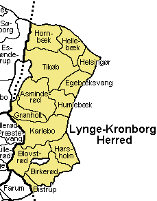 Lynge-Kronborg Herred Frederiksborg Amt , Denmark. Map by Svend-Erik Christiansen, edited by user:Nico-dk . Lynge kommune er kendt for sine mange sommerhuse